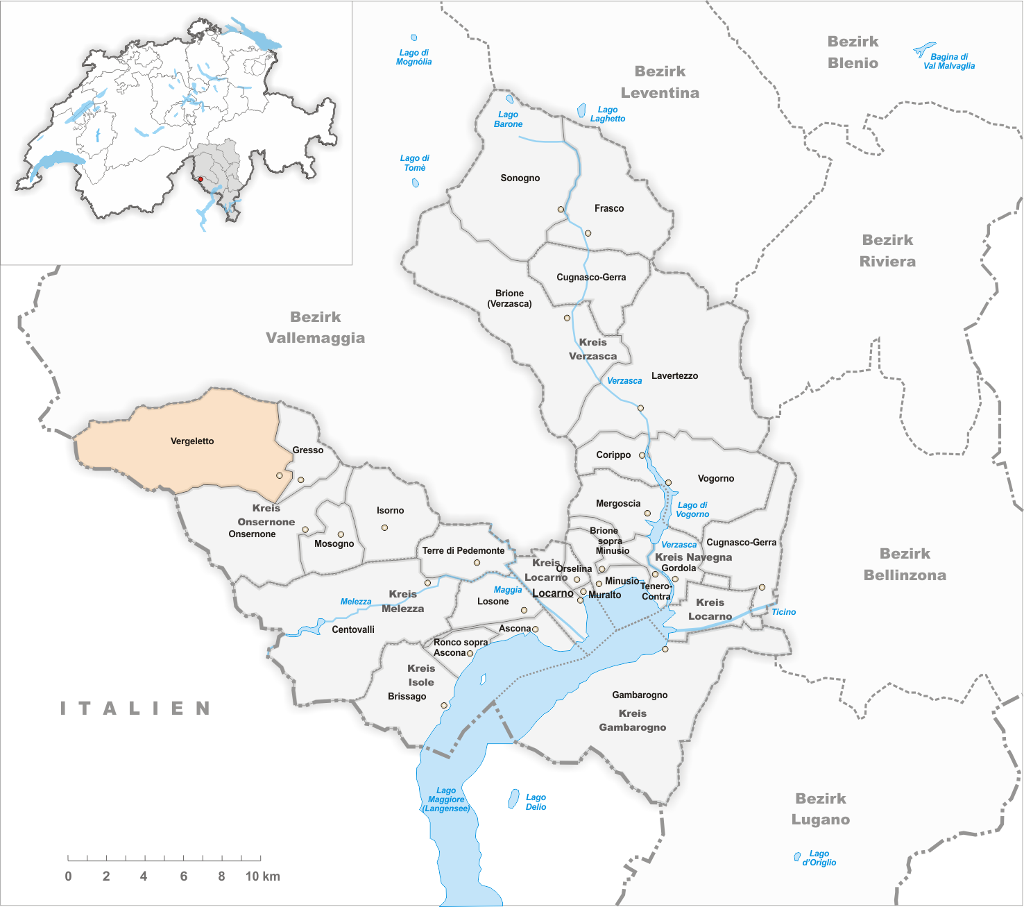 Municipality Vergeletto